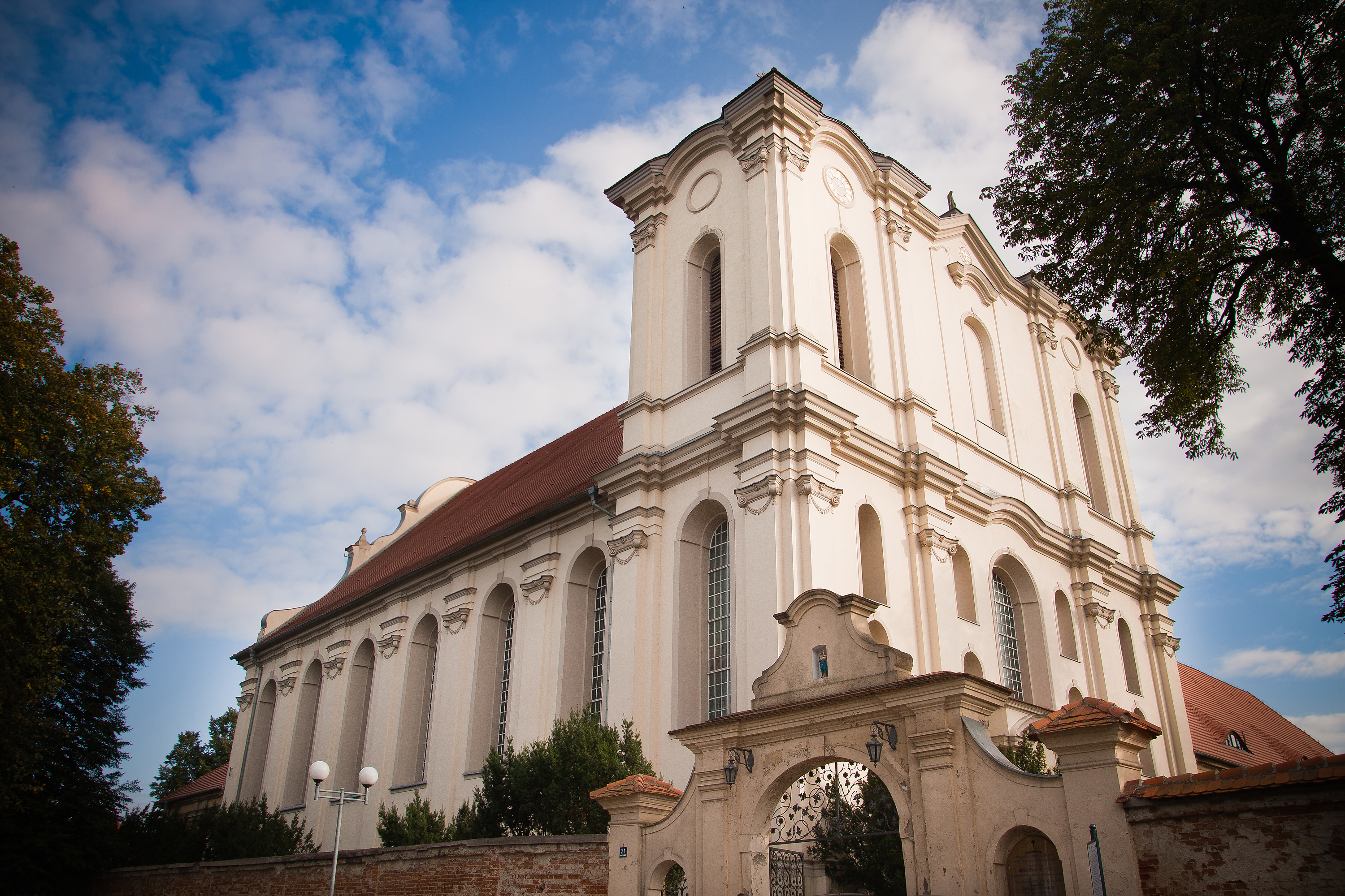 Wągrowiec - zespół klasztorny cystersów kościół, obecnie parafialny pw. Wniebowzięcia NMP.